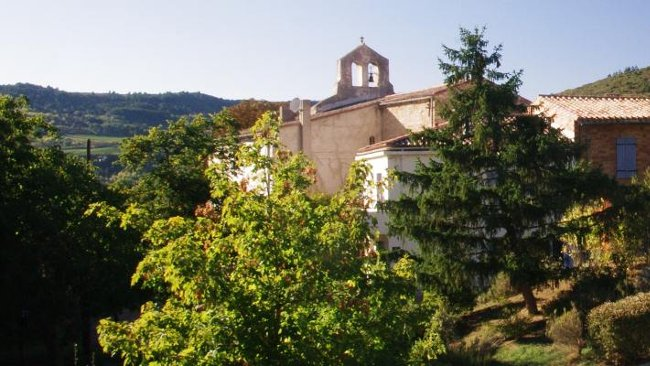 Vue de l'église Saint Léocadie